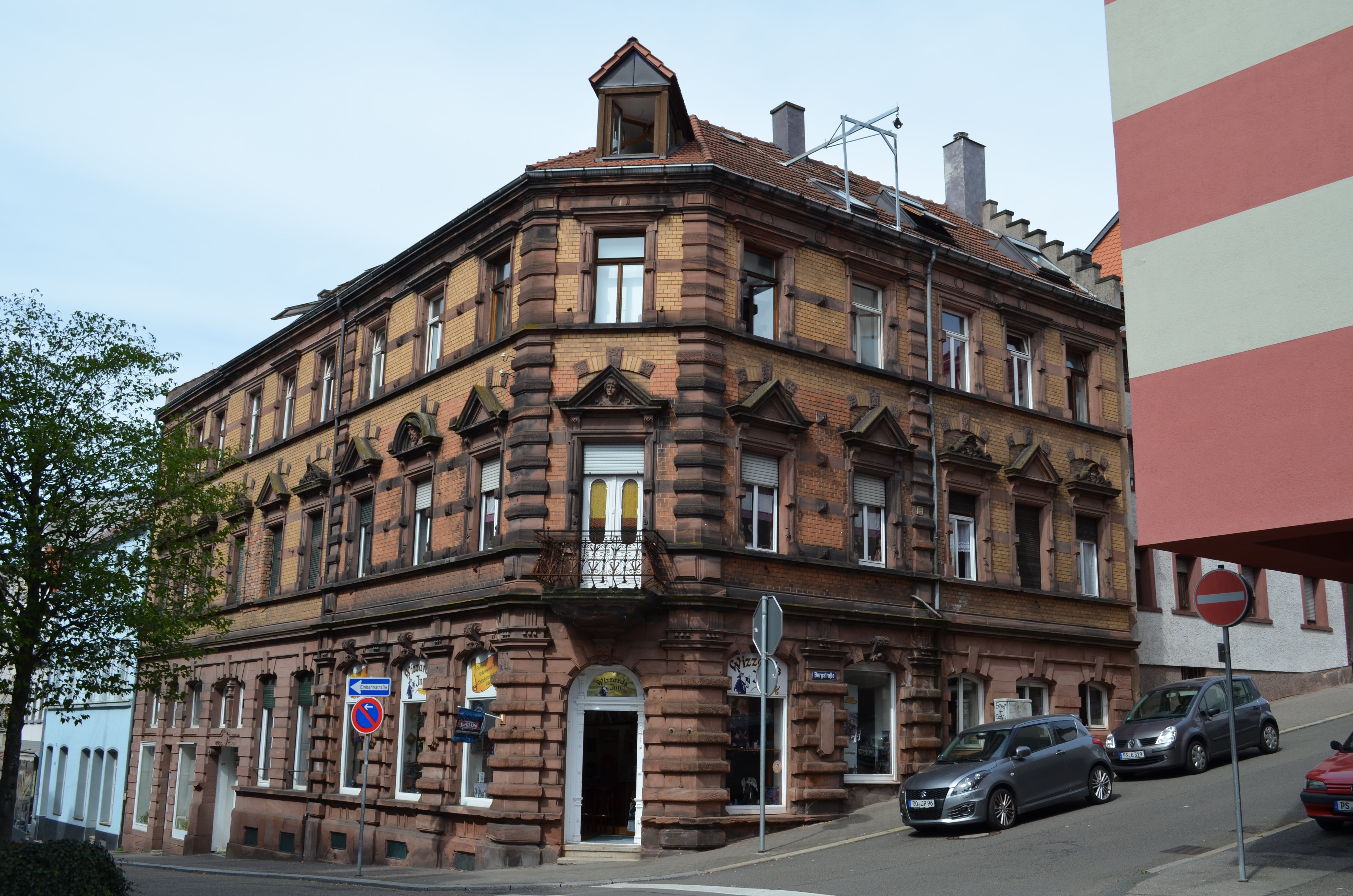 Pirmasens, Hauptstraße 95/97; Wohn- und Geschäftshaus, stattlicher dreigeschossiger Bau, Neurenaissance, Ende des 19. Jahrhunderts.